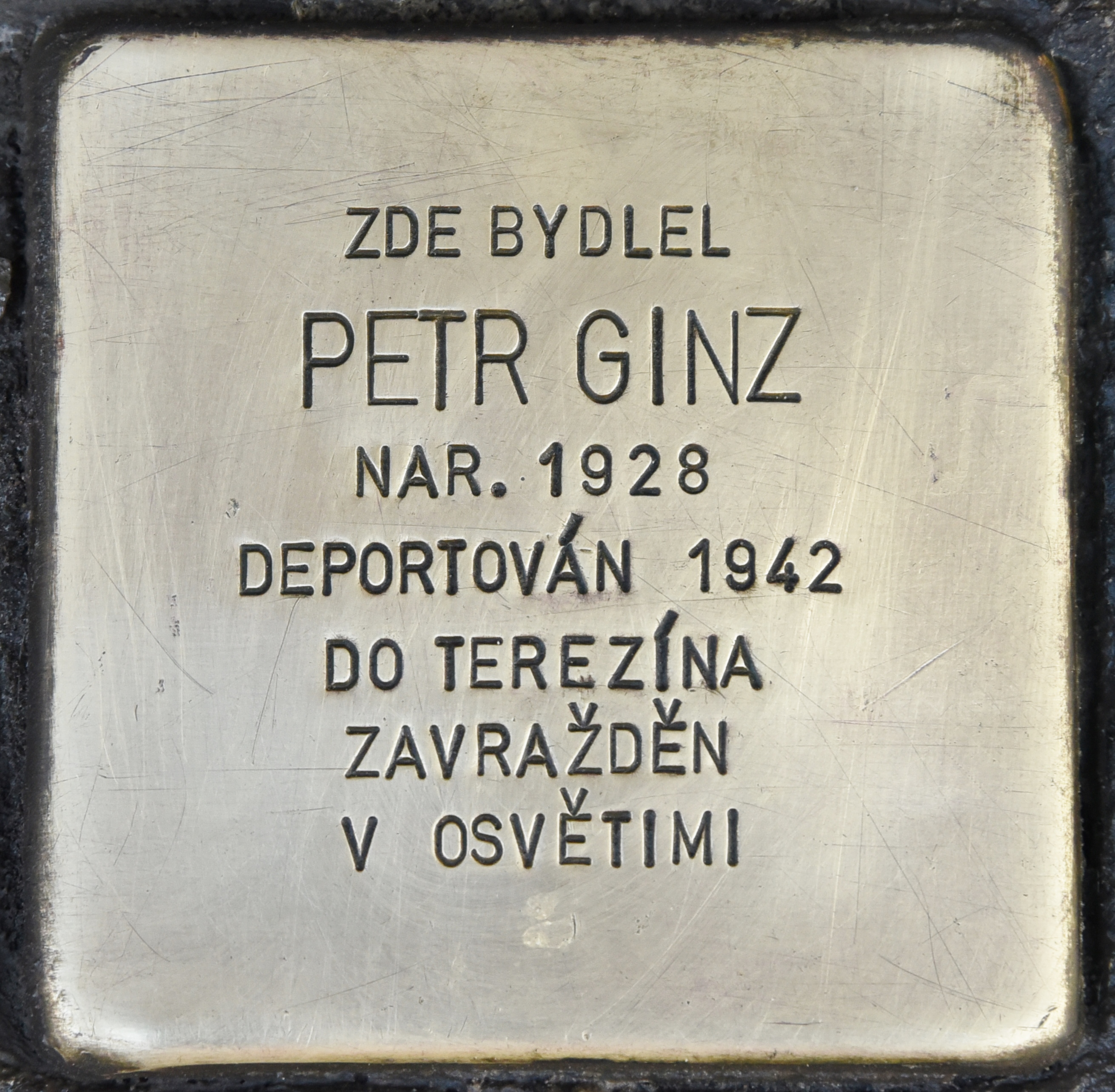 Stolperstein für Petr Ginz